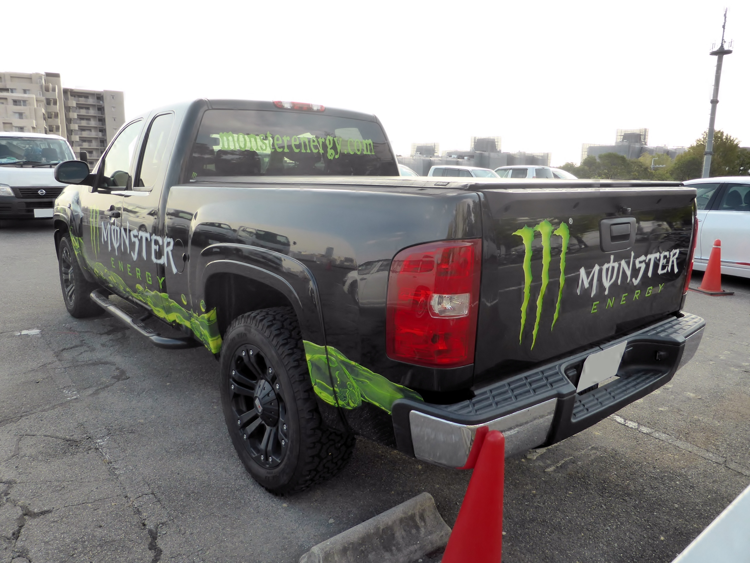 モンスターエナジーの広報車として使われているシボレー・シルバラードをリアから撮影